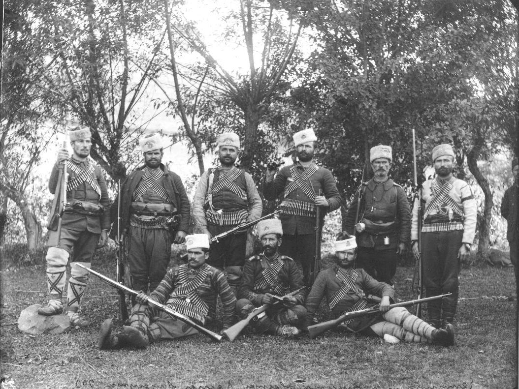 Cheta of IMARO voyvoda Iliya Karabiberov, 1903